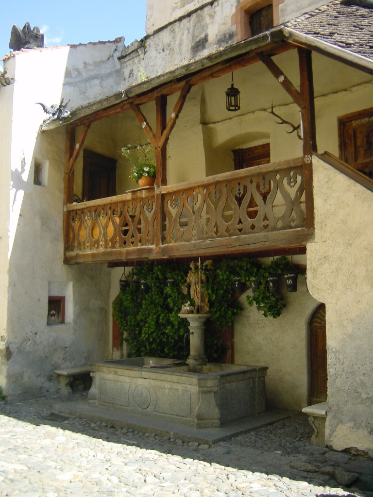 Churburg Südtirol (IT)